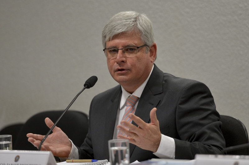 Rodrigo Janot em sabatina na Comissão de Constituição e Justiça do Senado Federal do Brasil.